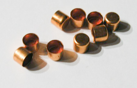 Współczesne kapiszony prod. czeskiej